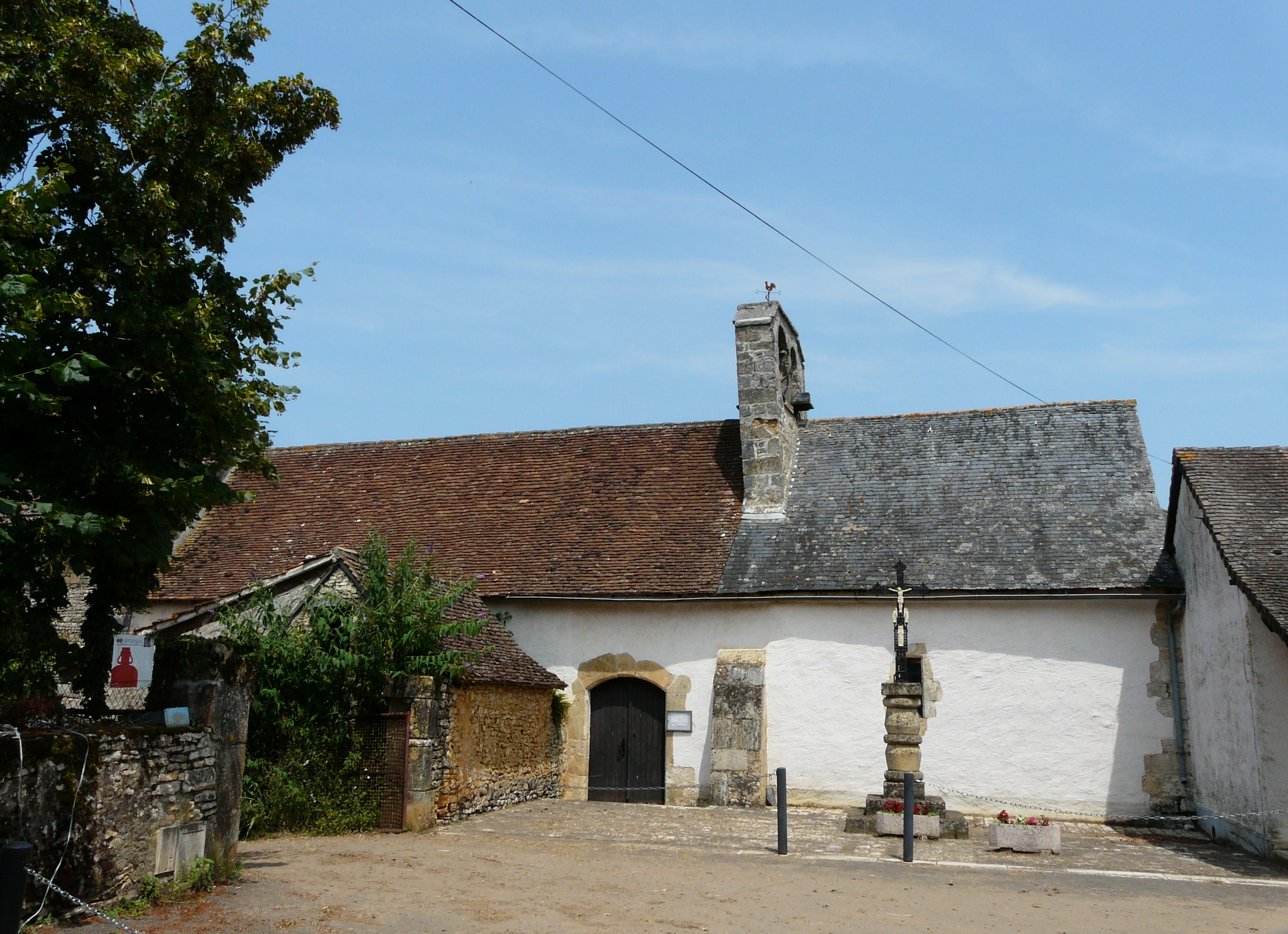 L'église de Temple-Laguyon, Dordogne, France.